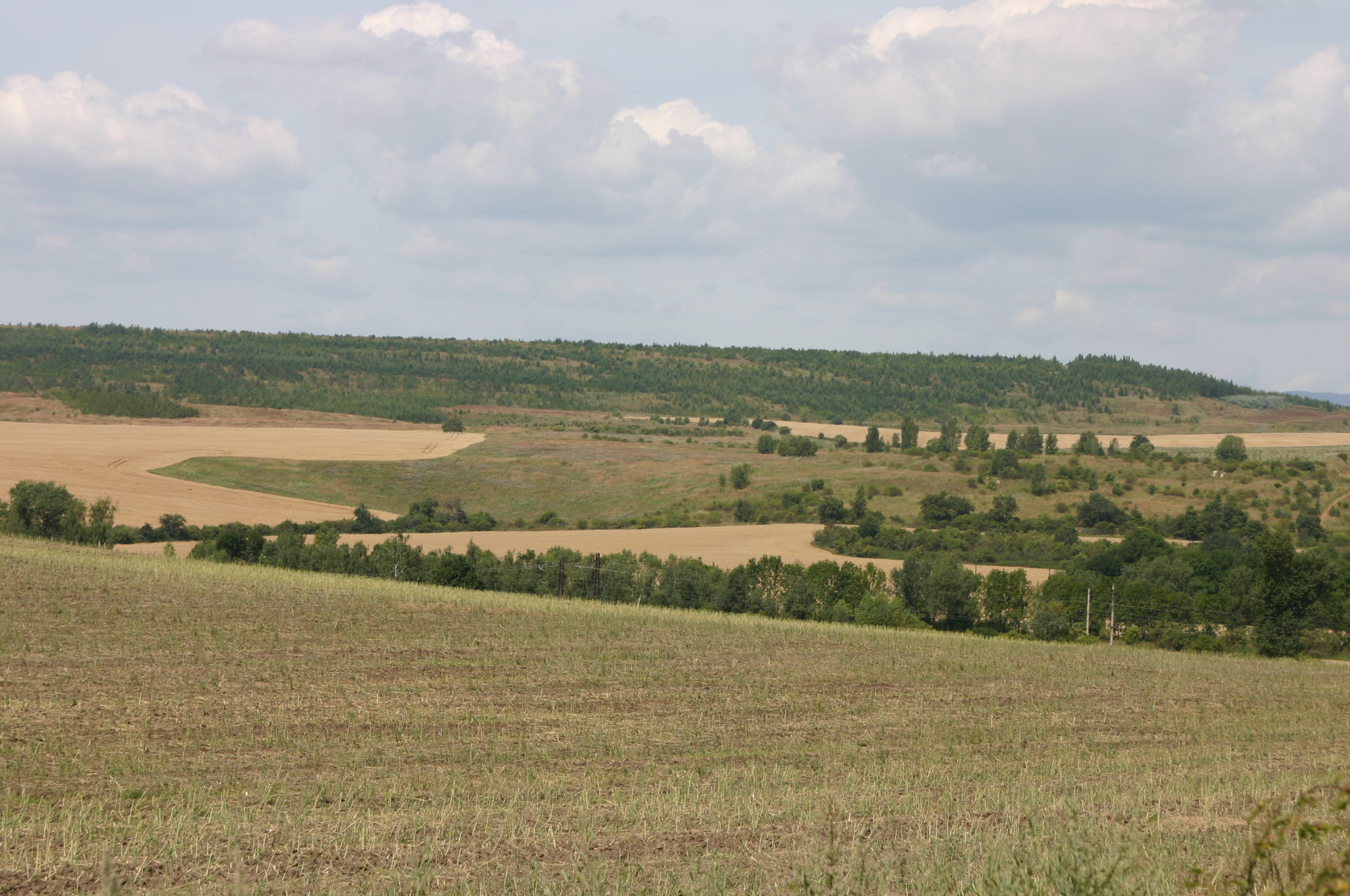 Velebudická výsypka v místech zaniklé obce Židovice v okrese Most